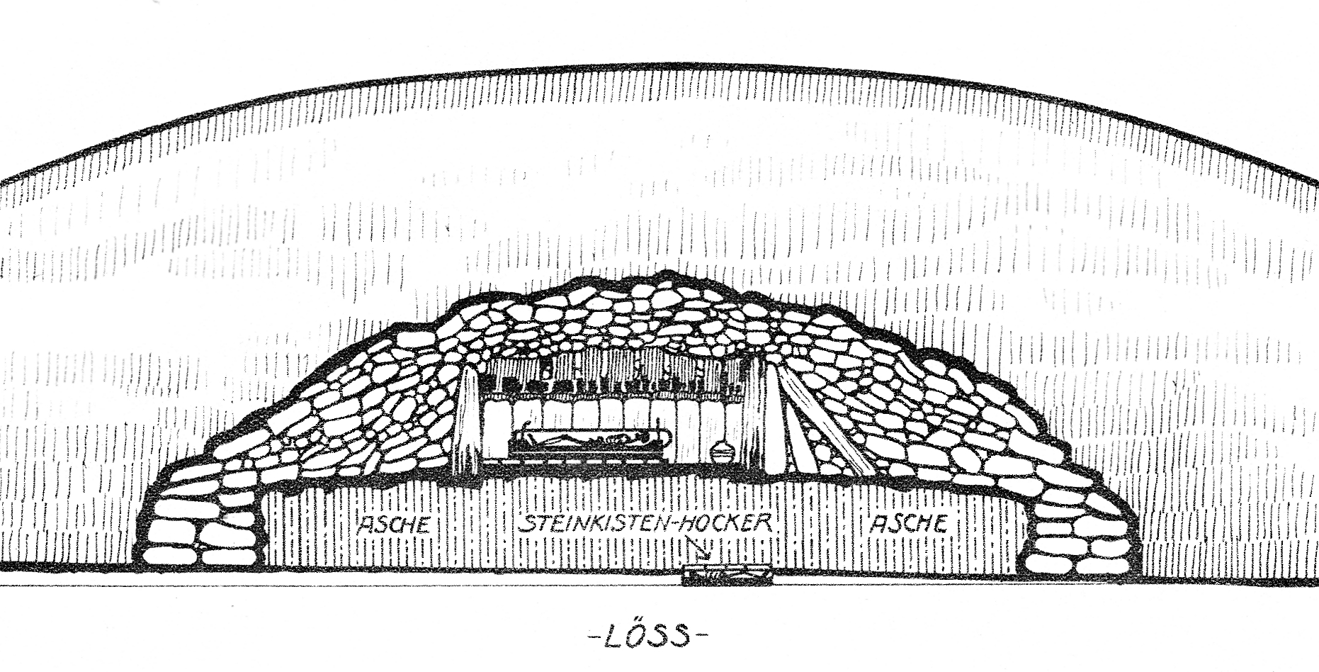 Querschnitt durch das Fürstengrab von Helmsdorf